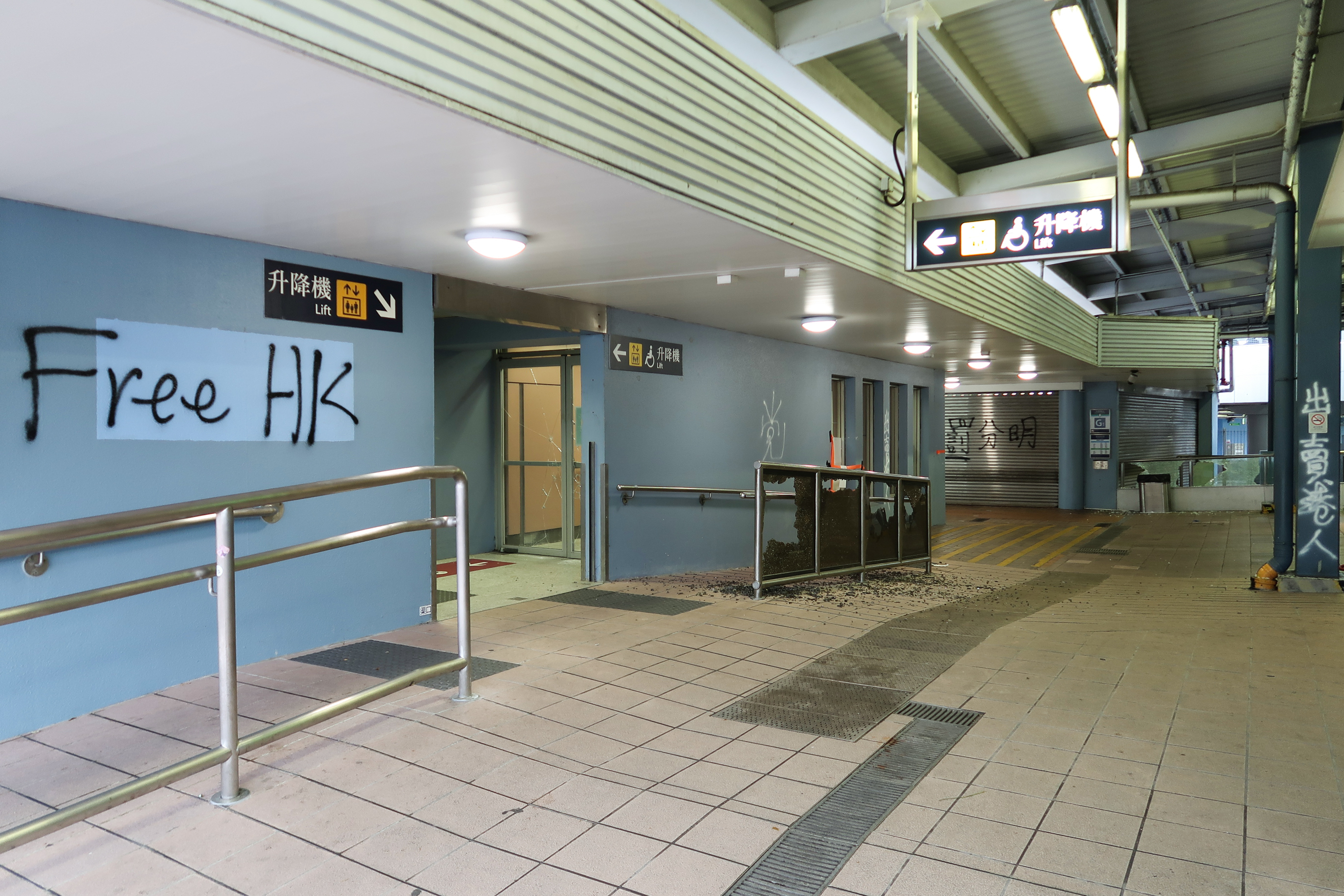 Kowloon Tong Station damage